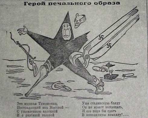 Карикатура времен Великой Отечественной войны на маршала Семёна Константиновича Тимошенко.